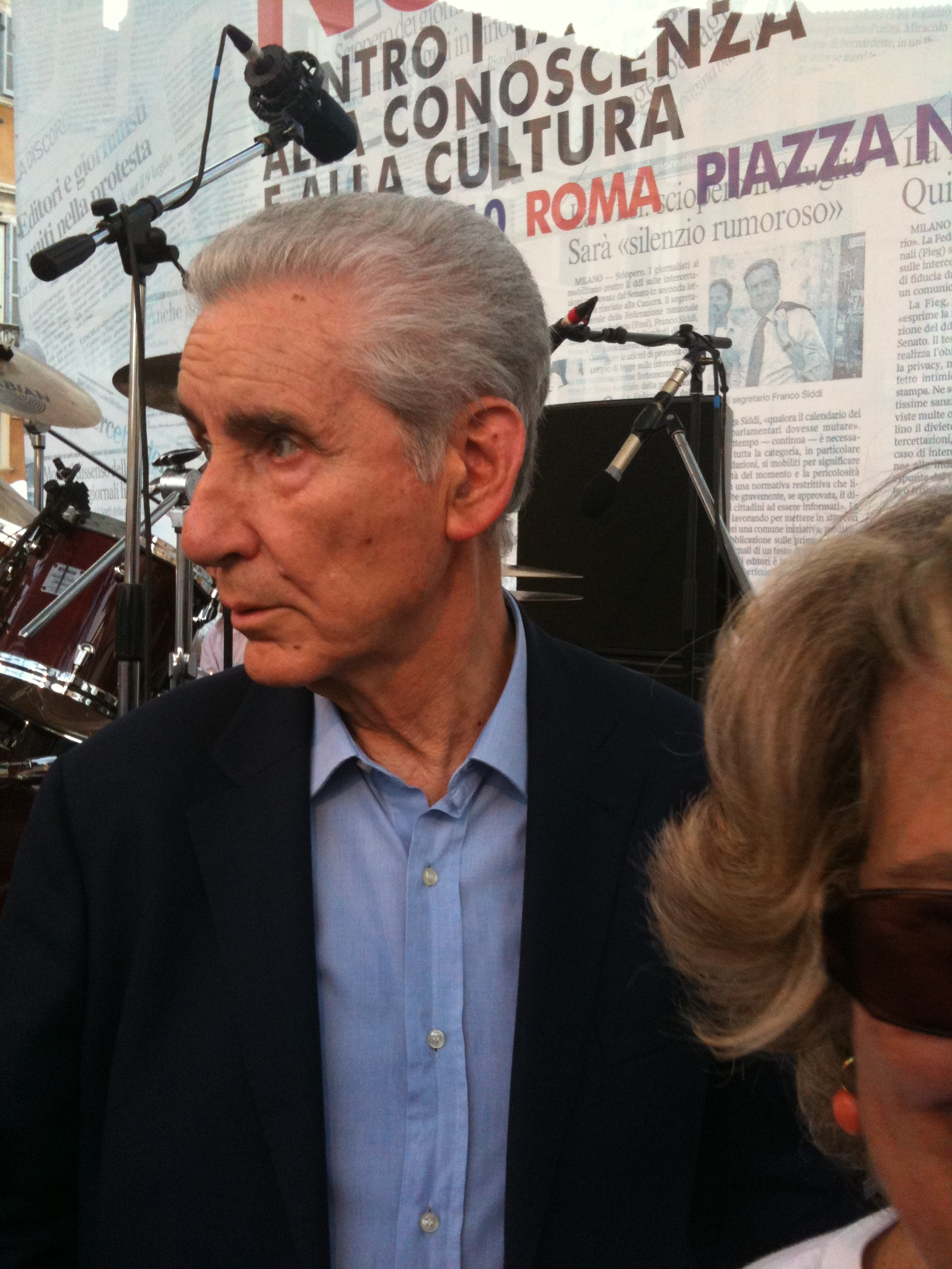 Stefano Rodotà a piazza Navona scende dal palco dopo l'intervento contro la cosiddetta "legge bavaglio" del 1° luglio 2010